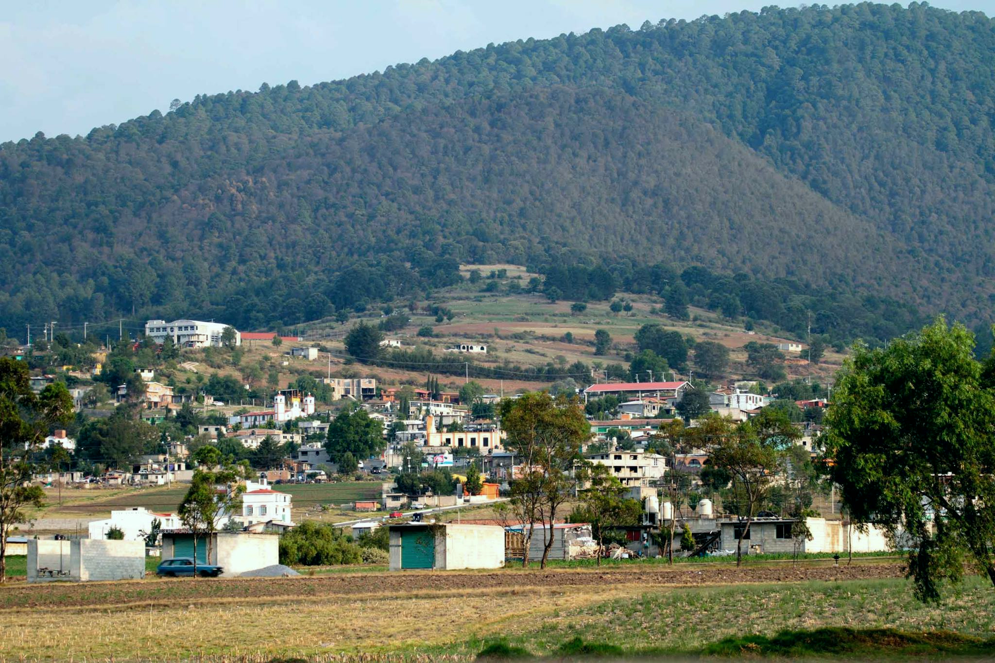 La Jordana se localiza en el Municipio de El Oro, Estado de México, México